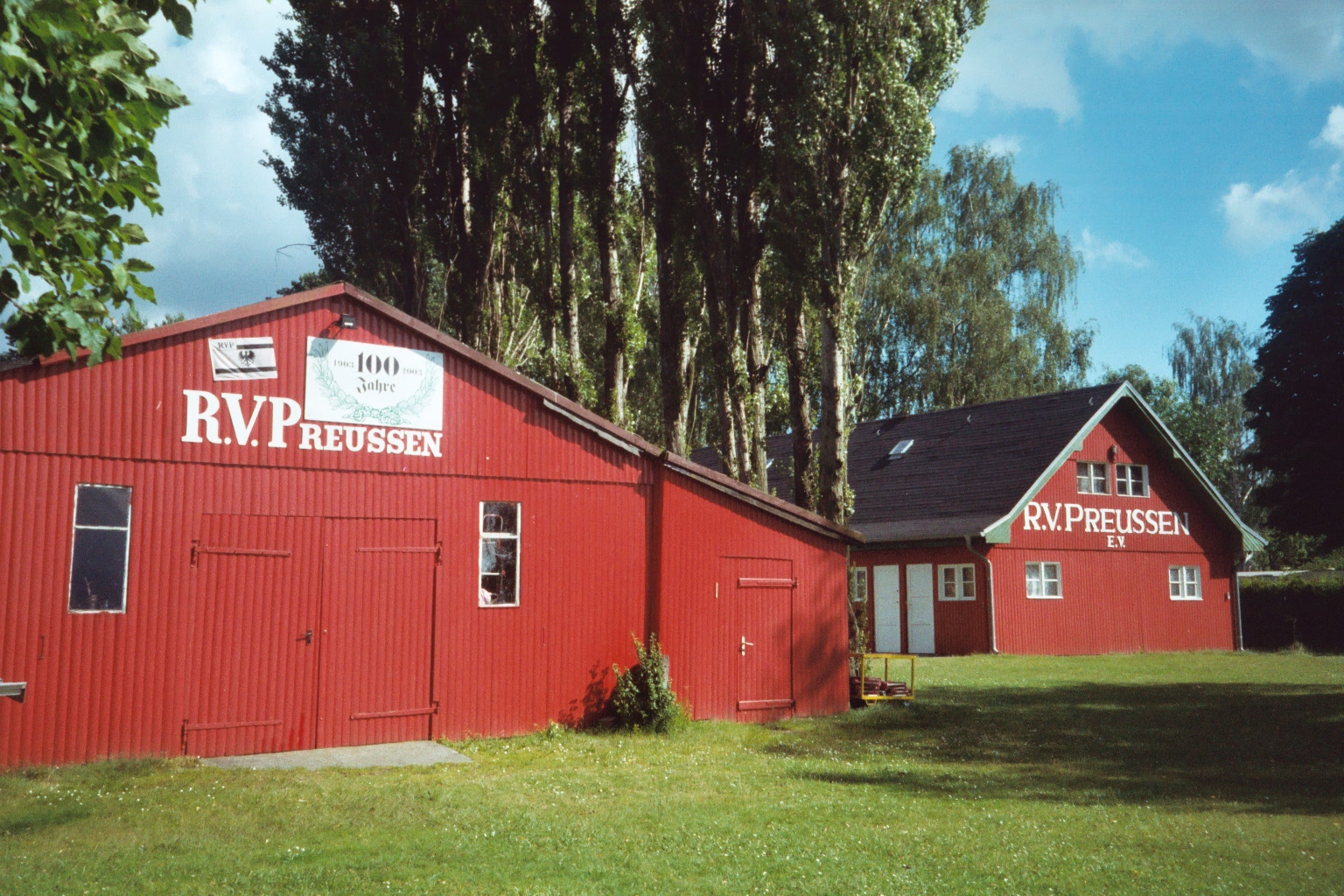 Gelände des Ruder-Verein "Preußen" e.V. Berlin